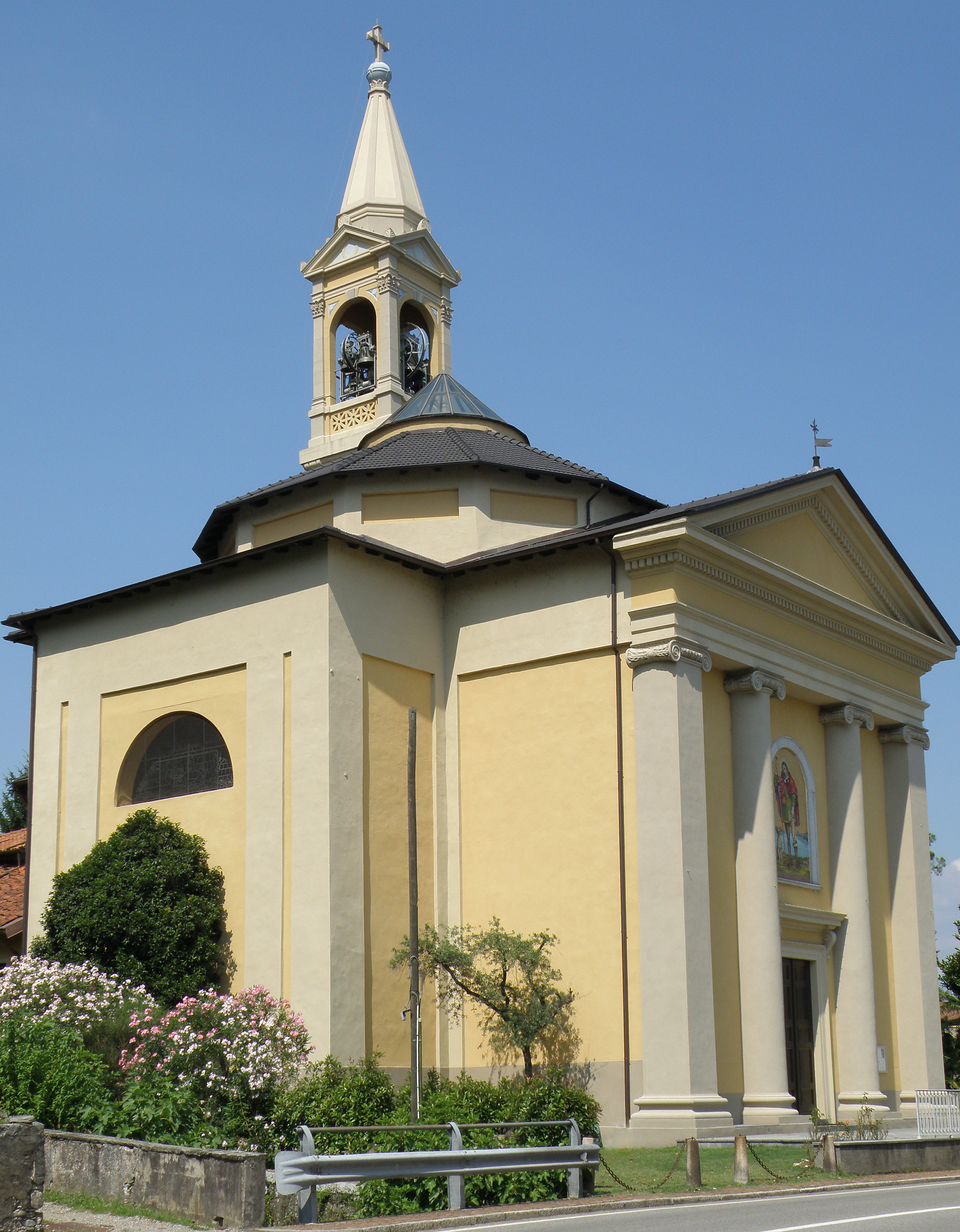 Solcio, fraz. del comune di Lesa (NO). Chiesa di San Rocco.